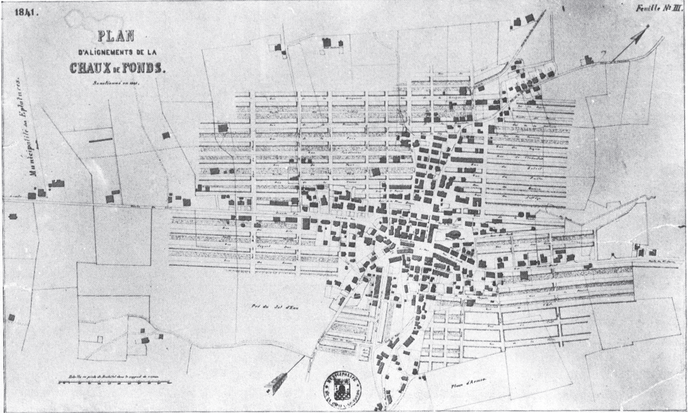 Plan de La Chaux-de-Fonds, Charles-Henri Junod, 1841. Baulinienplan.